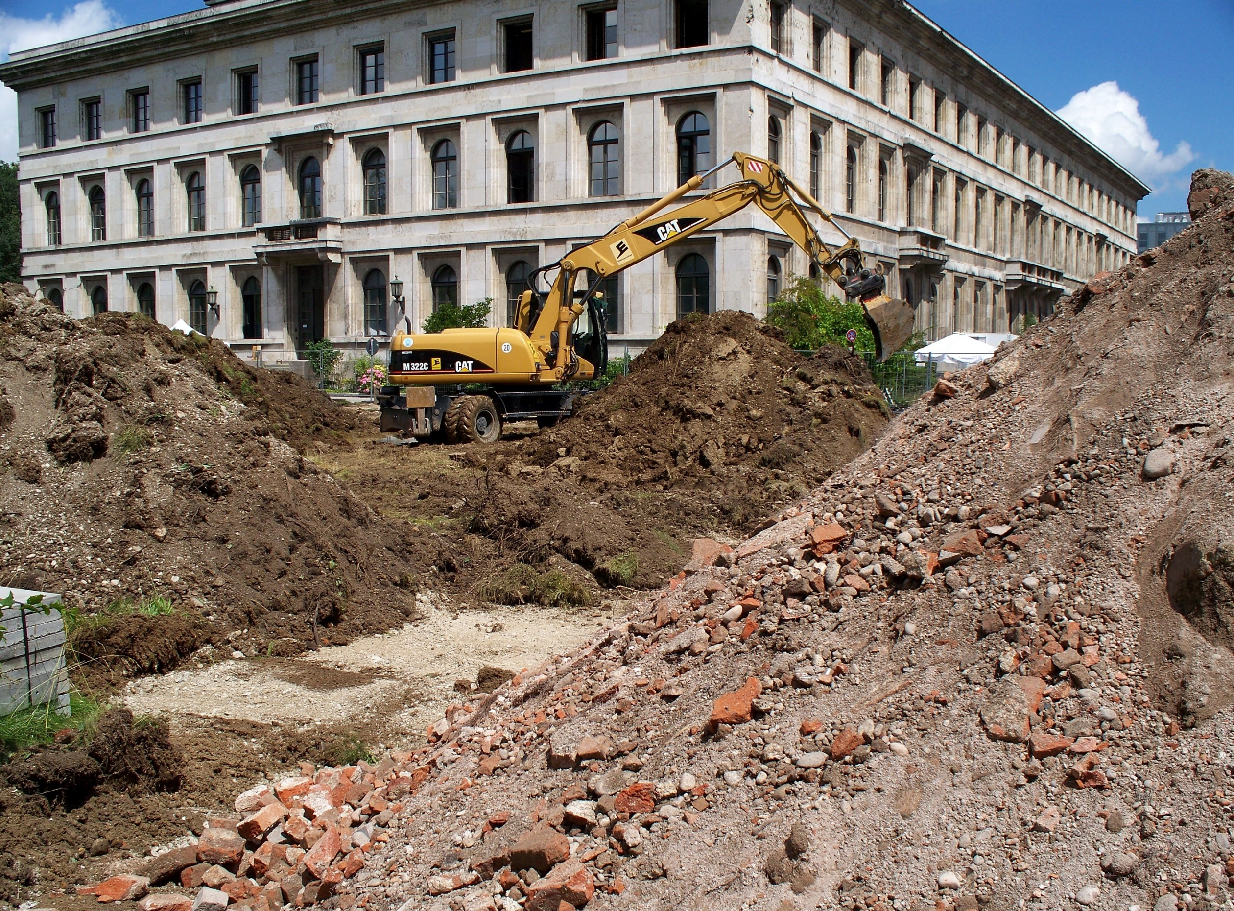 Bauarbeiten für das NS-Dokumentationszentrum in München.